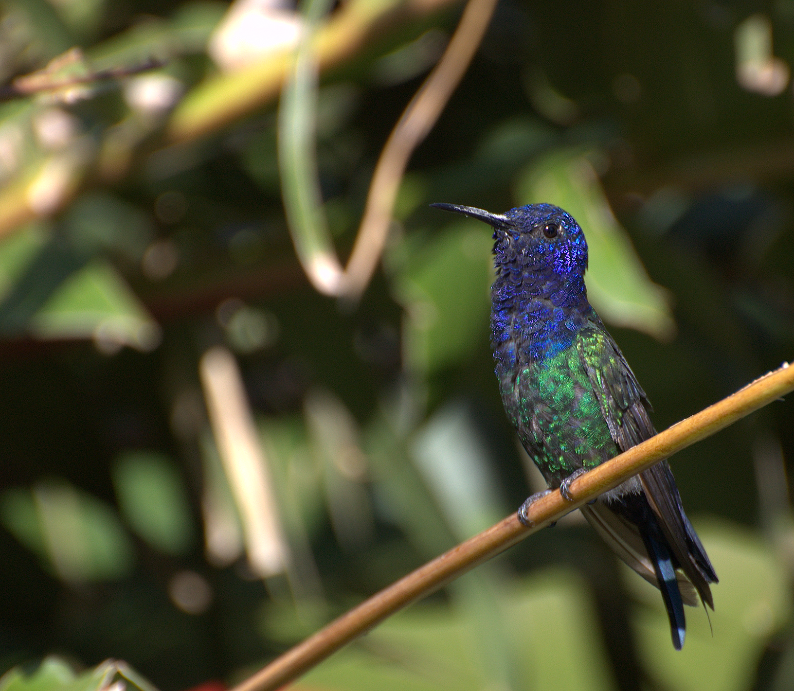 EPR - VIVEIRO DE MUDAS NATIVAS - Fazenda Vô-Vó - Piraju-SP .br/index.php.htm